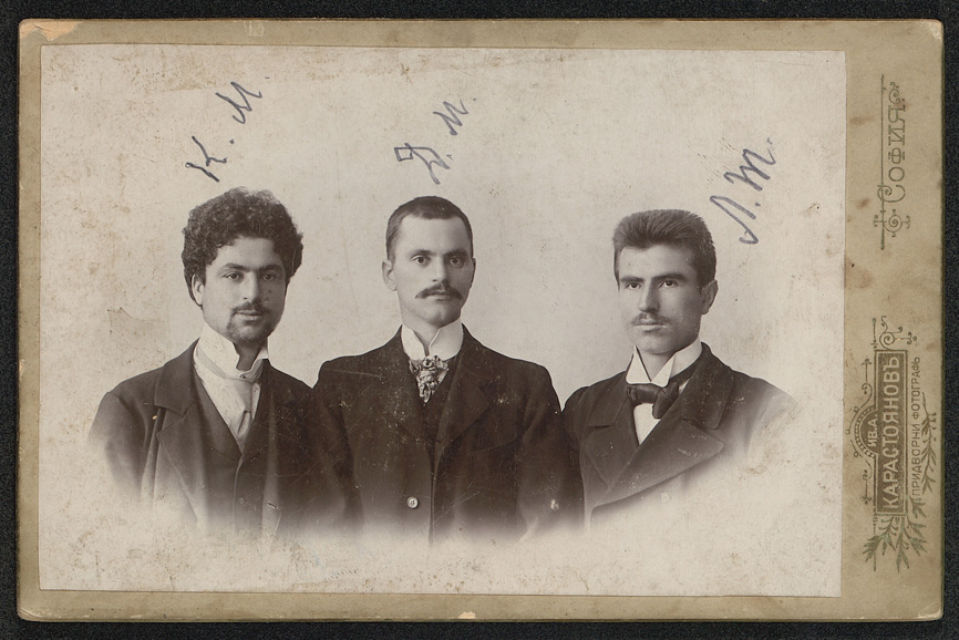 Kocho_Molerov_Dimitar_Molerov_Lazar_Tomov